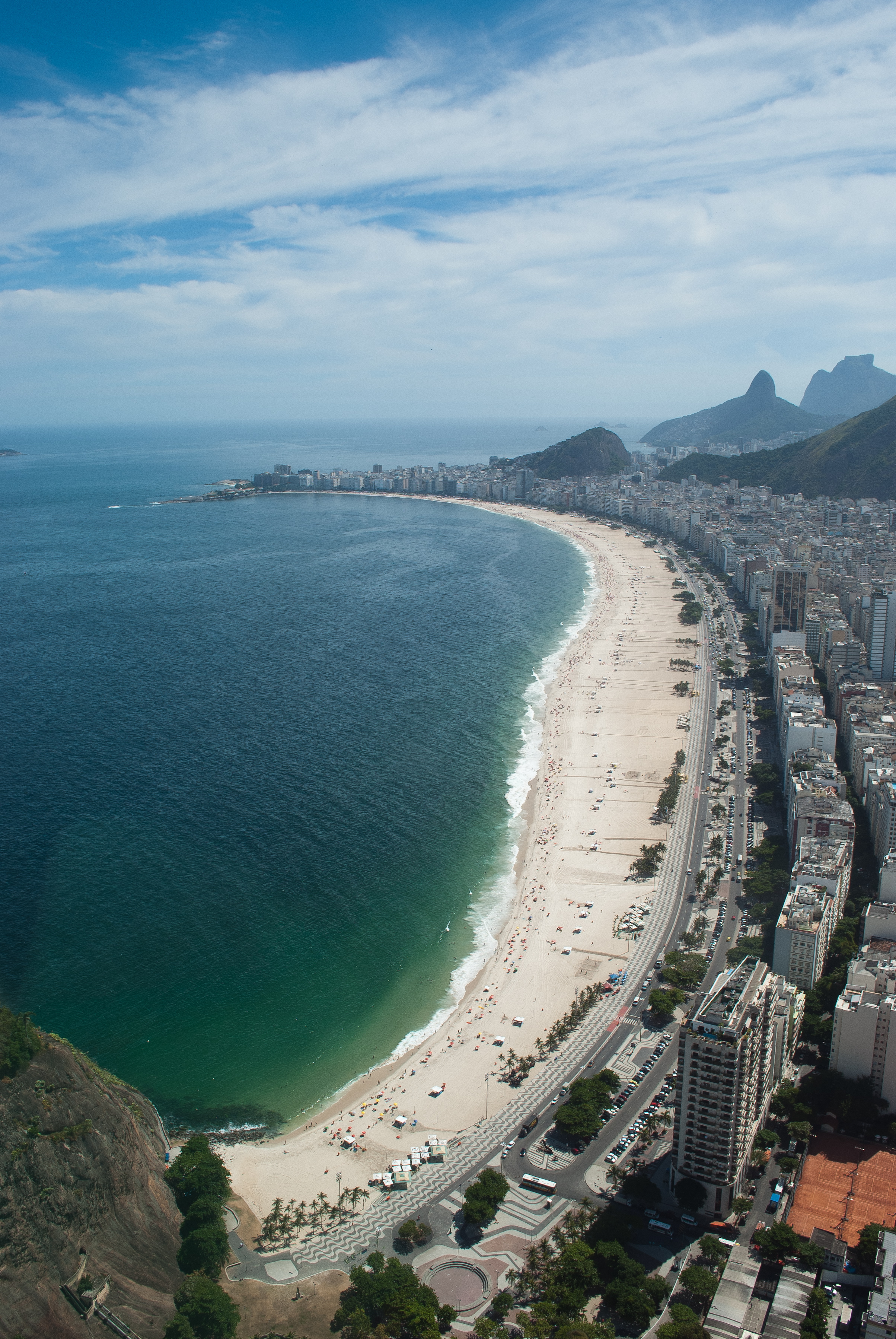 Vista aerea de Copacabana - Río de Janeiro, Brasil - Febrero 2011